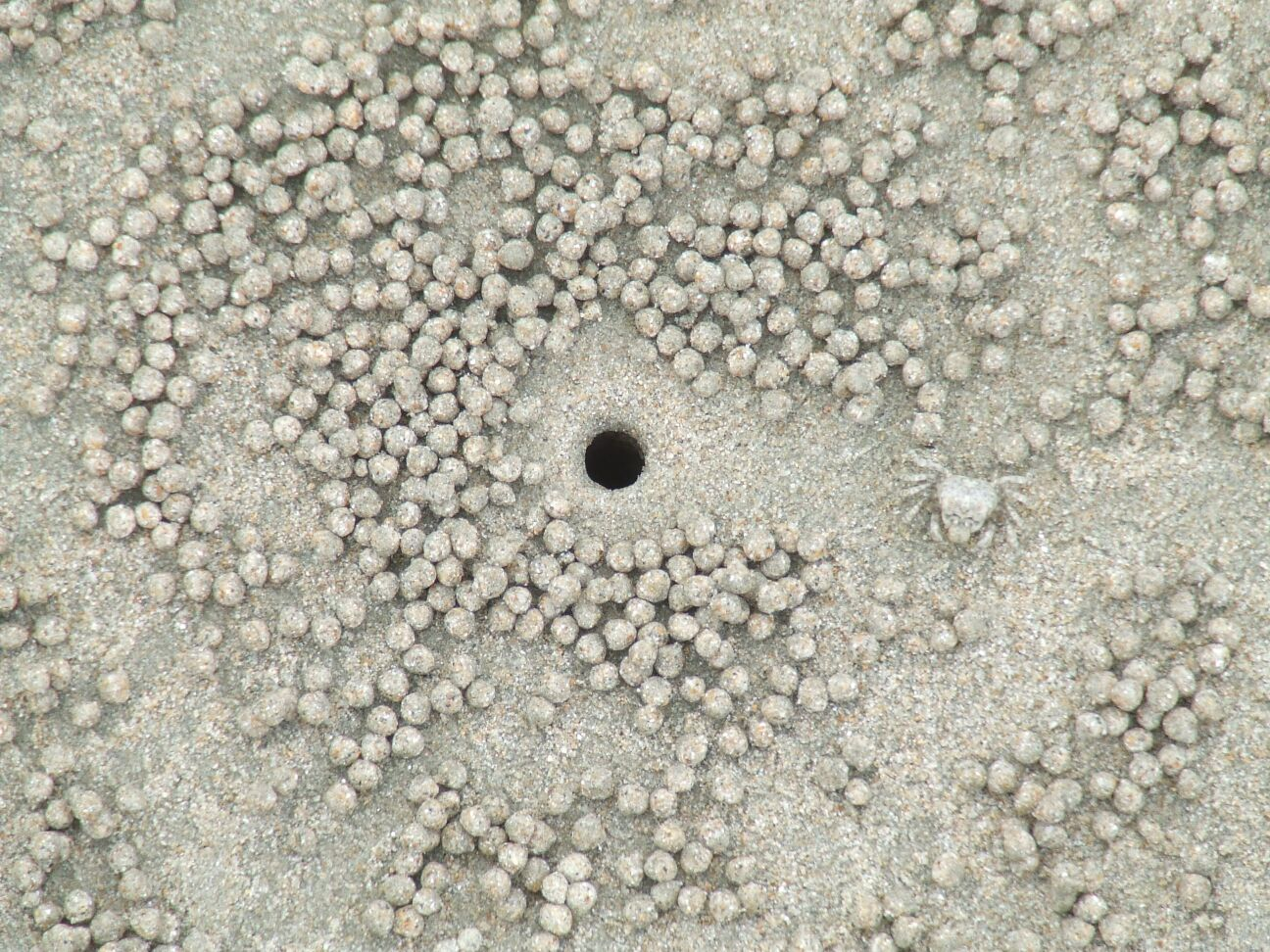 Eine thailändische Strandkrabbe aus der Familie Ocypodidae (Artname nicht bekannt) mit Wohnloch und den beim Fressen entstehenden Sandkugeln. Größe der Krabbe etwa 5 bis 10 mm.